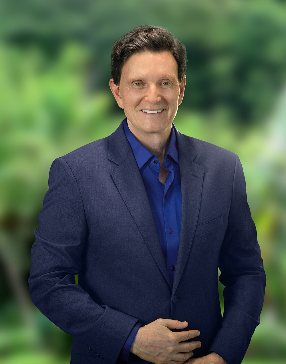 Foto do Prefeito do Rio de Janeiro em 2017, Marcelo Crivella